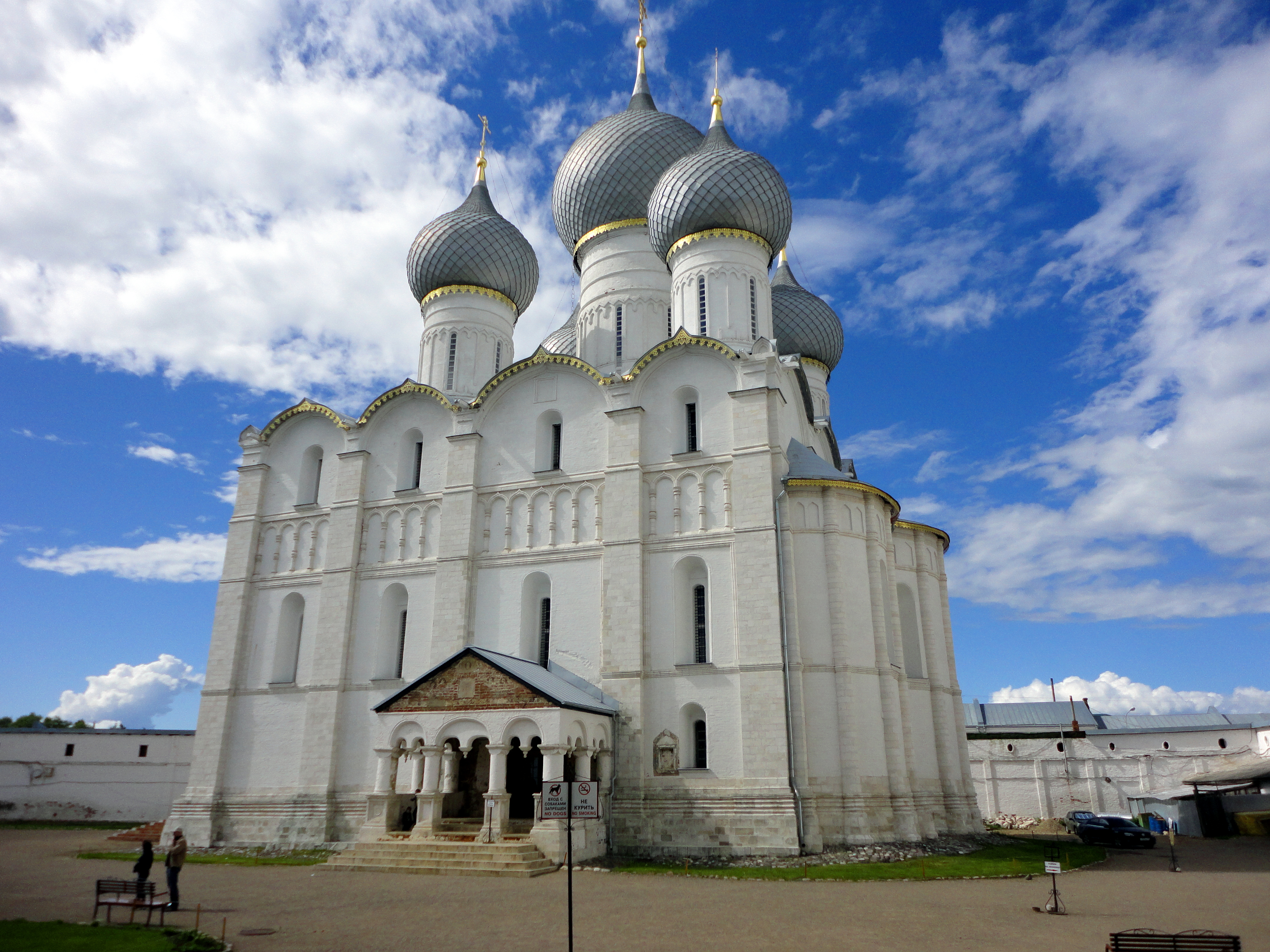 Собор Успенский: Ростов, Ярославская область